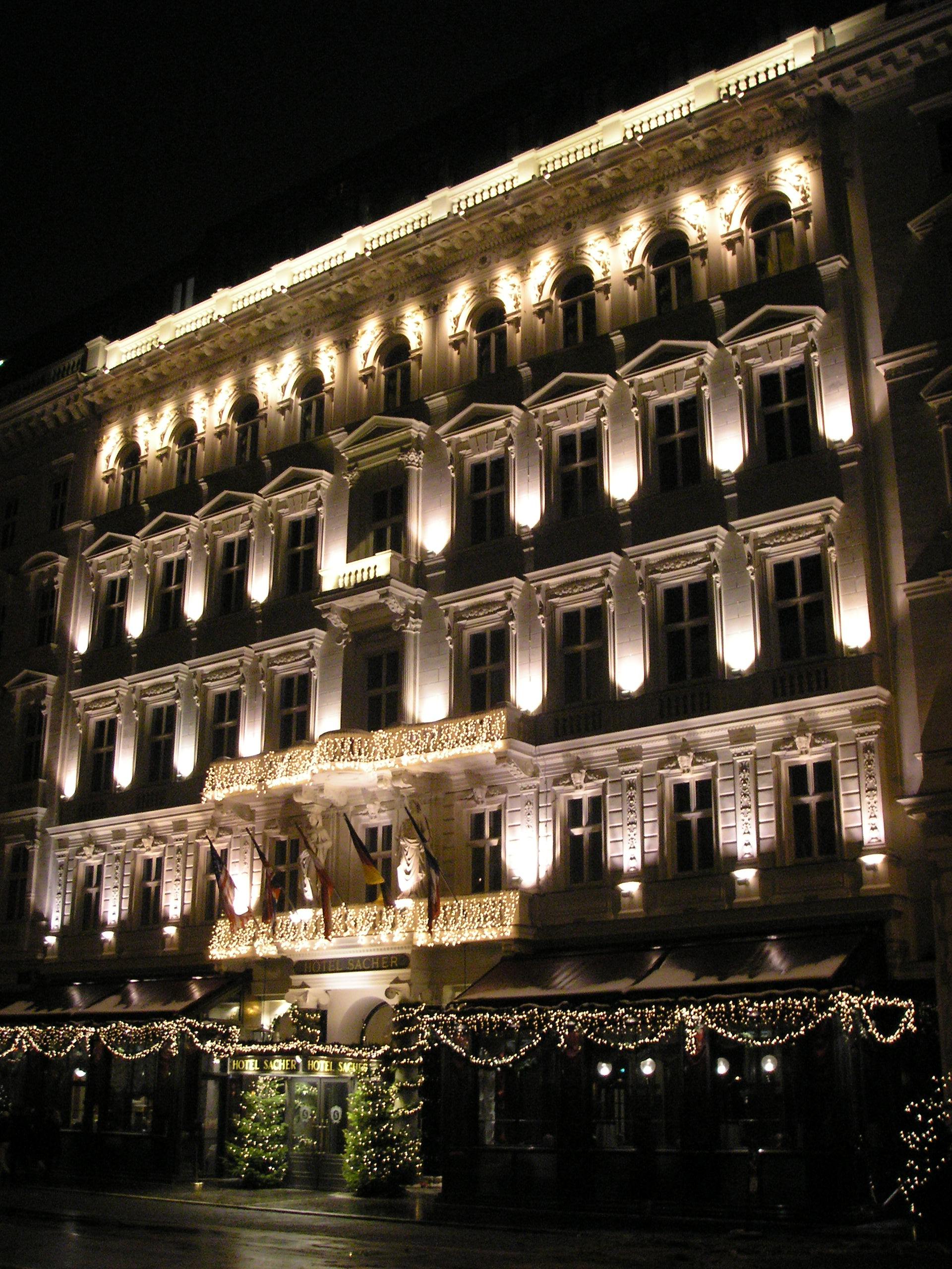 Description: Hotel Sacher in Vienna. Das Hotel Sacher in Wien, neben der Wiener Staatsoper. Source: self-made, I release it into the public domain.